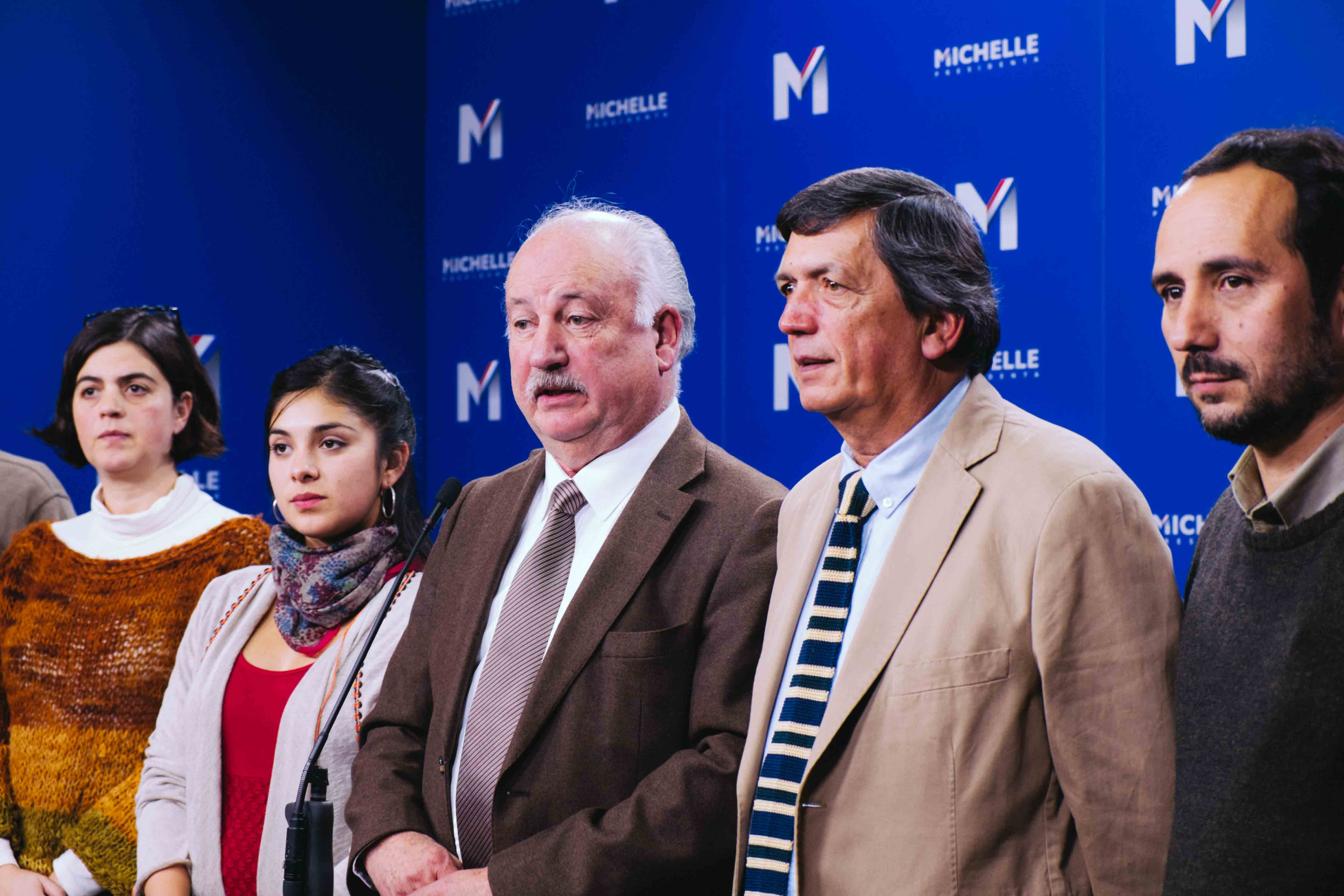 La directiva del Partido Comunista oficializa su apoyo a la precandidata presidencial Michelle Bachelet.